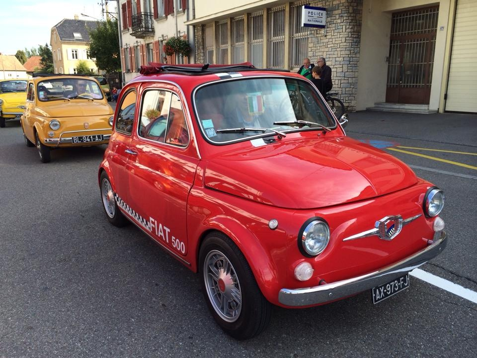 Défilé de fiat durant le festival - Photo offerte par